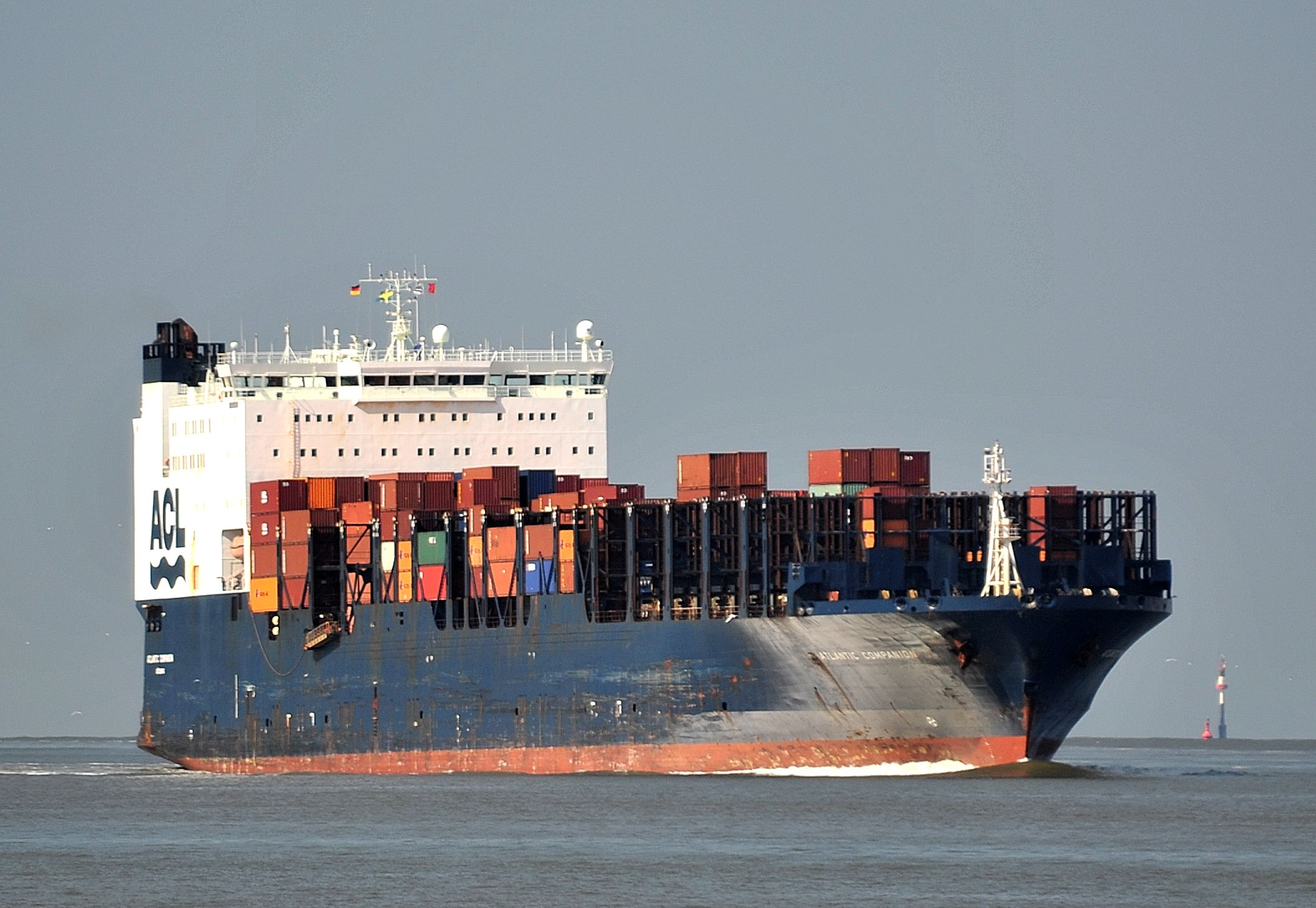 Von See kommend vor Cuxhaven in Richtung Hamburg